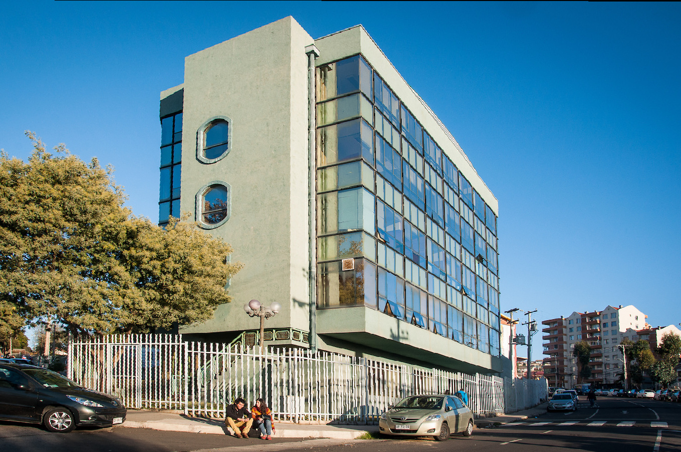 Puntaangeles UPLA